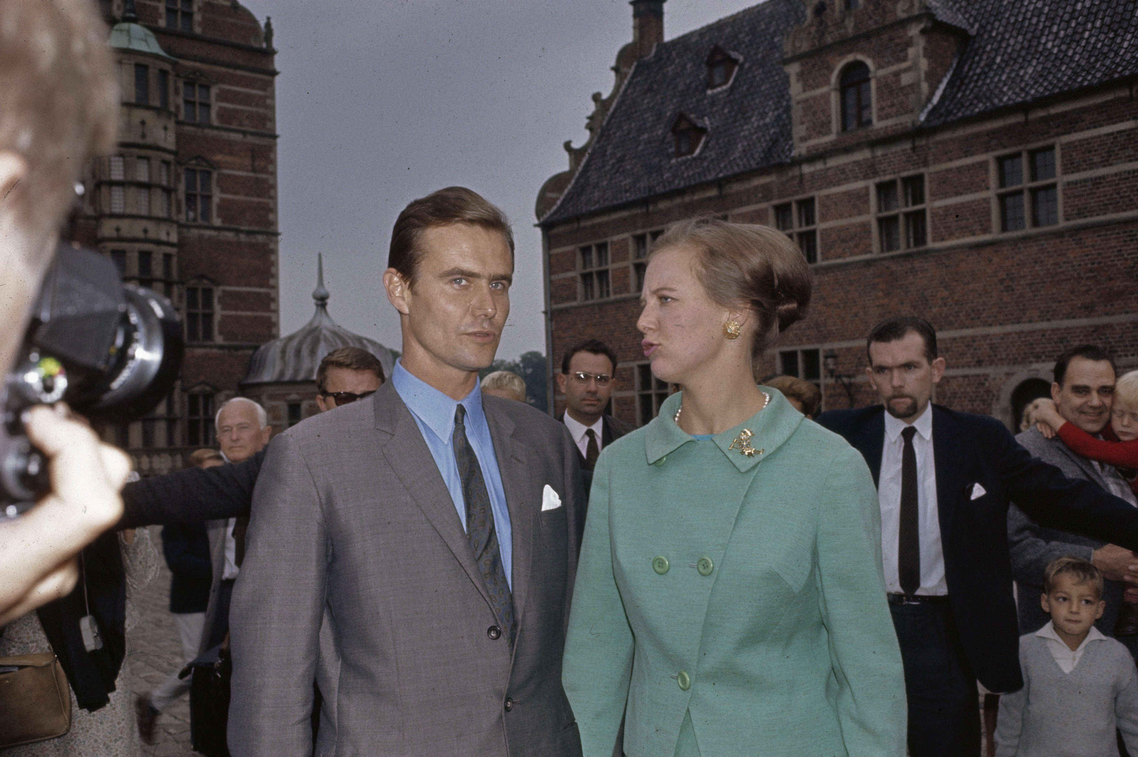 Collectie / Archief : Fotocollectie Anefo Reportage / Serie : [ onbekend ] Beschrijving : koninklijke verloving in Kopenhagen Datum : 4 september 1966 Locatie : Denemarken, Kopenhagen Trefwoorden : prinsessen, verlovingen Persoonsnaam : Hendrik, prins van Denemarken, Margaretha, prinses van Denemarken Fotograaf : Fotograaf Onbekend / Anefo Auteursrechthebbende : Nationaal Archief Materiaalsoort : Dia (kleur) Nummer archiefinventaris : bekijk toegang 2.24.01.06 Bestanddeelnummer : 254-7692